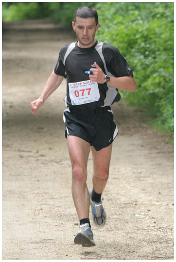 Németh Csaba ultramaratonista a Terep Százas futóversenyen (Magyarország)